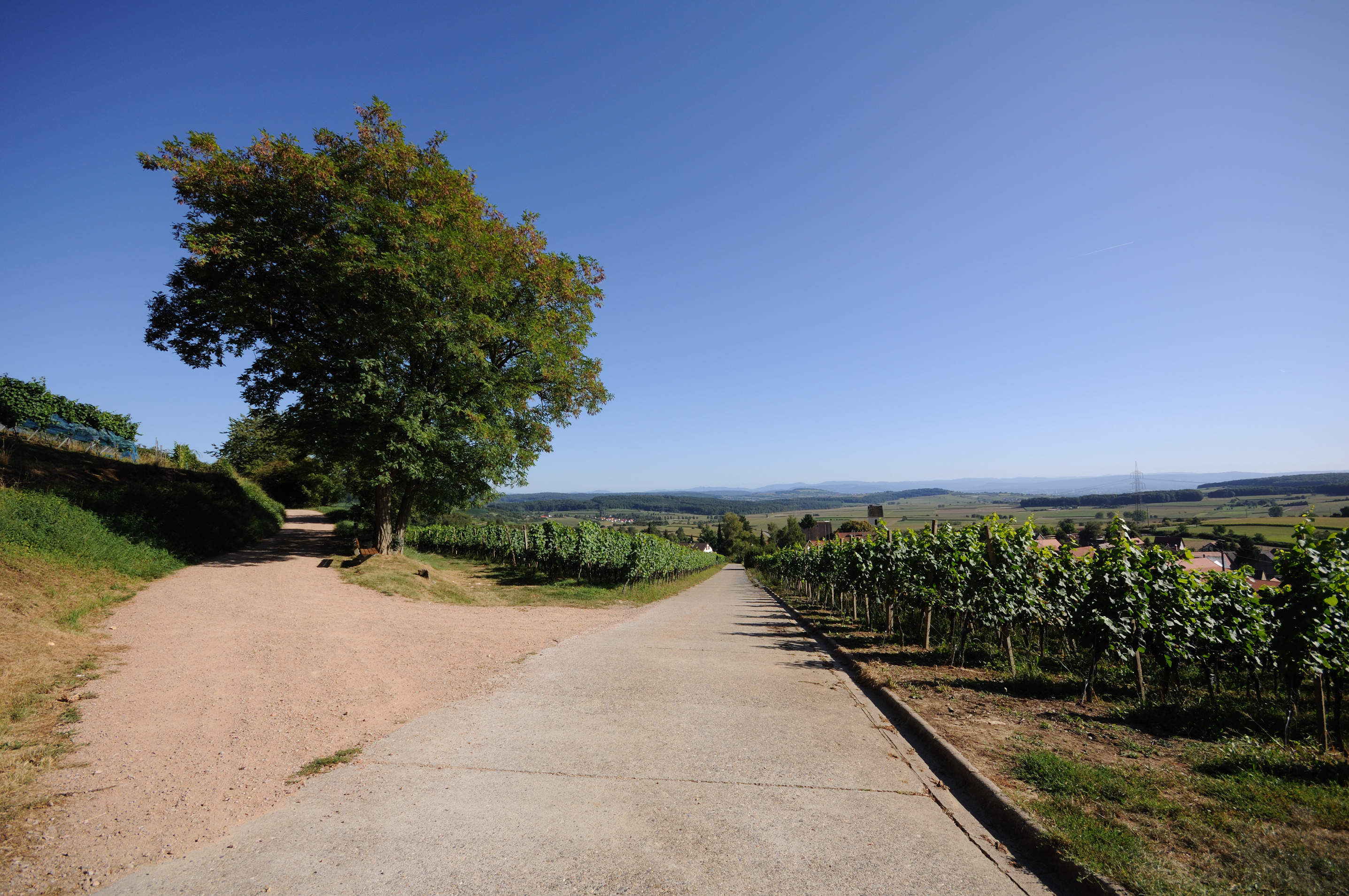 Blick auf Tannenkirch